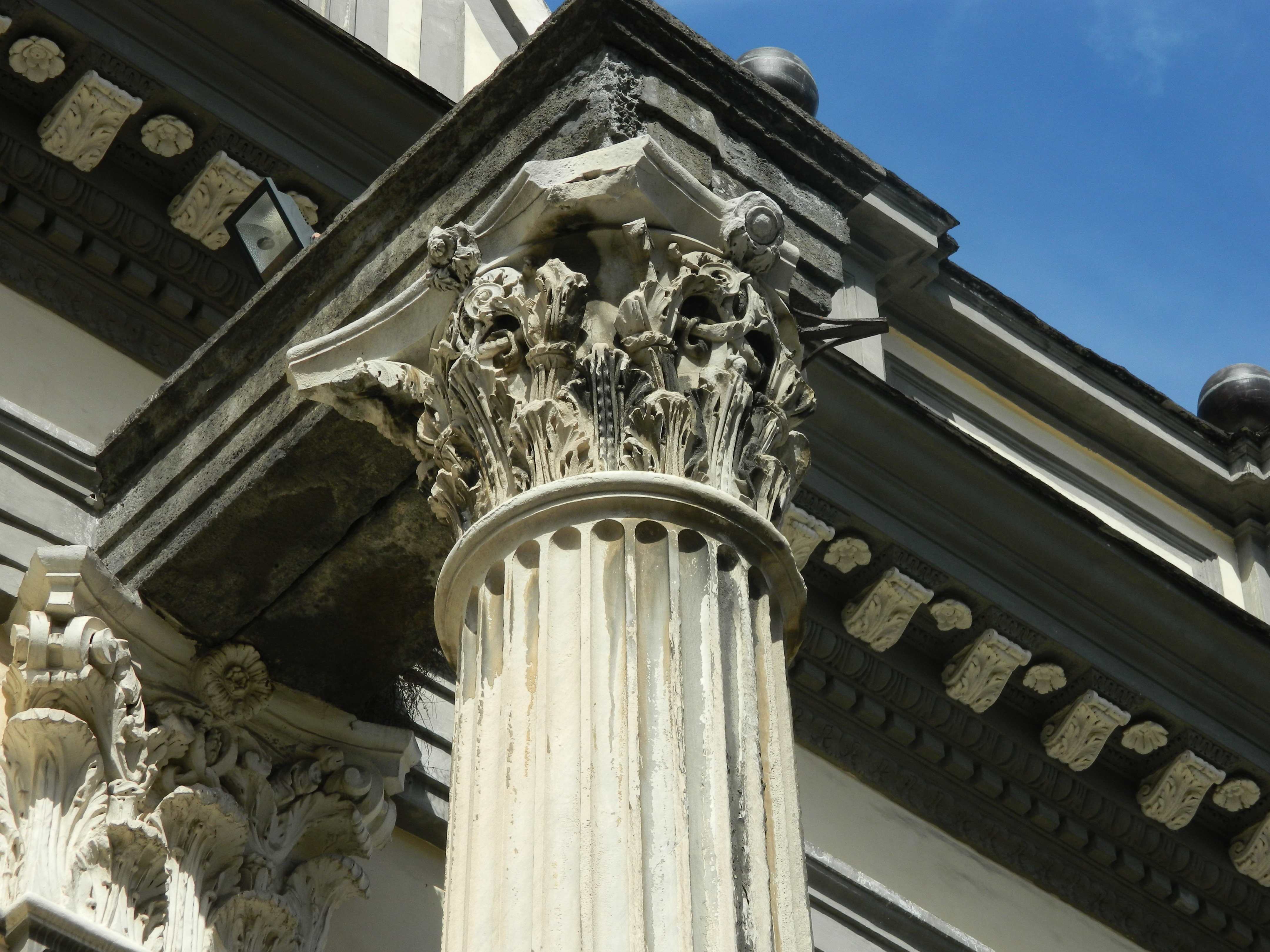 San Paolo Maggiore (particolare facciata) - Napoli. Capitello corinzio di spoglio dal Tempio dei Dioscuri.